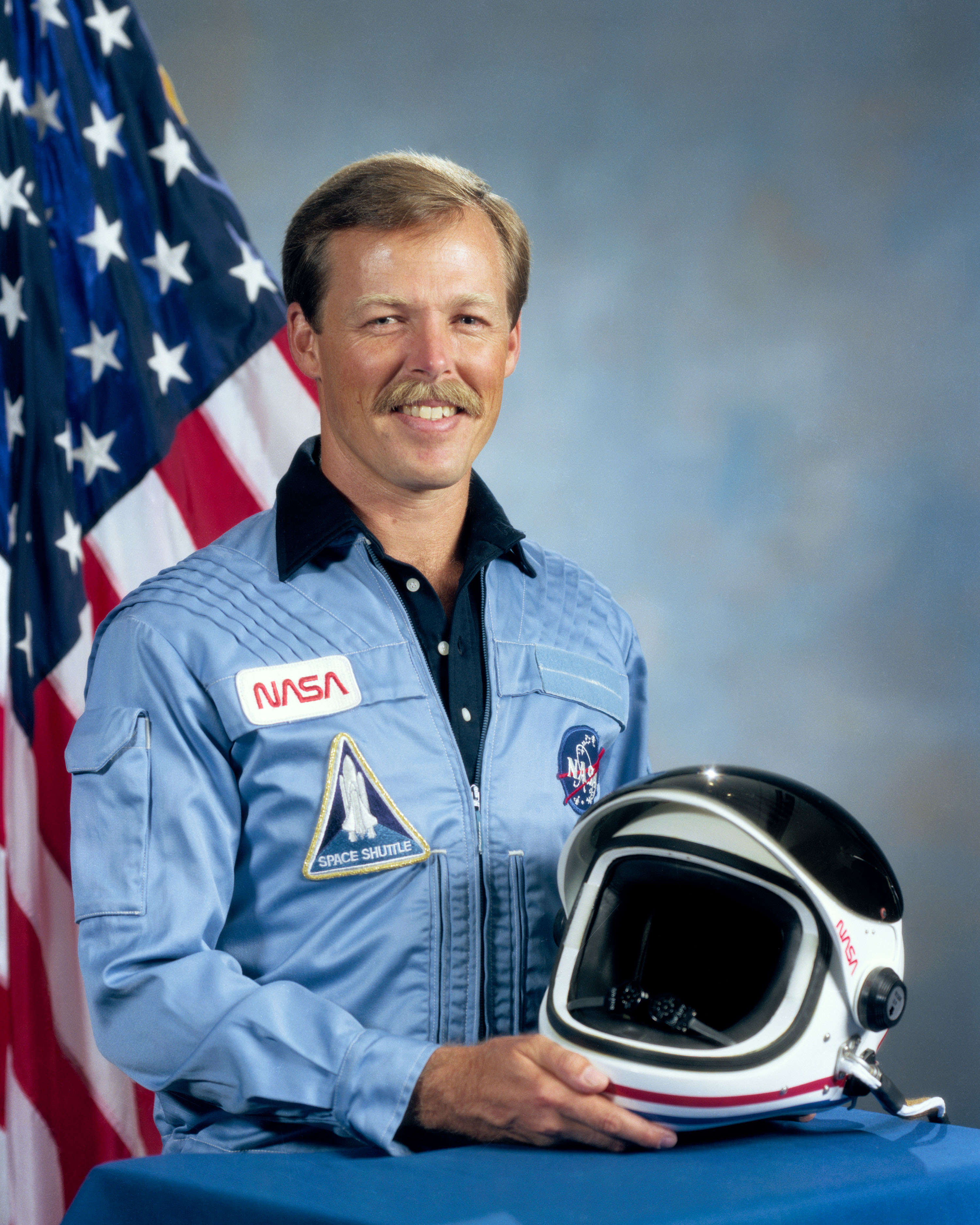 S84-42271 (24 Sept. 1984) --- Astronaut Robert L. Gibson.